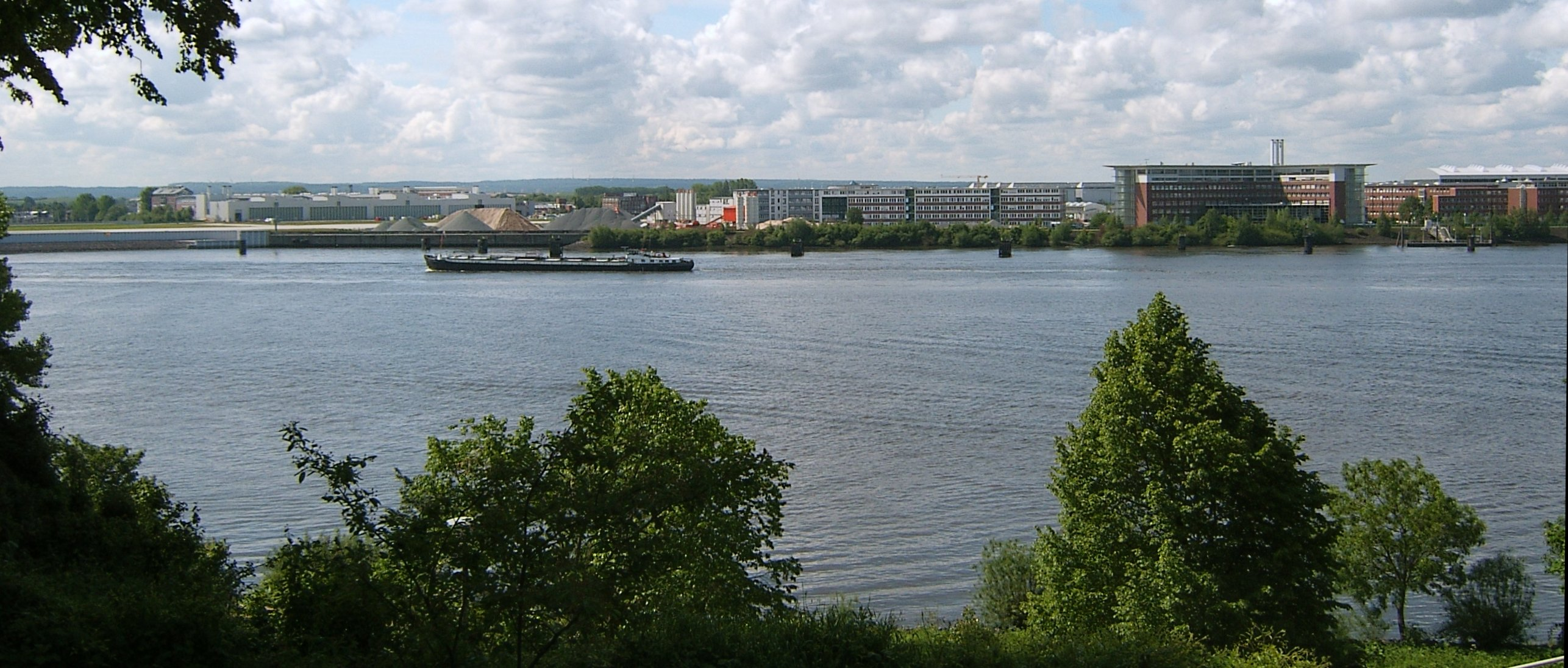 Werksgelände von EADS in Finkenwerder